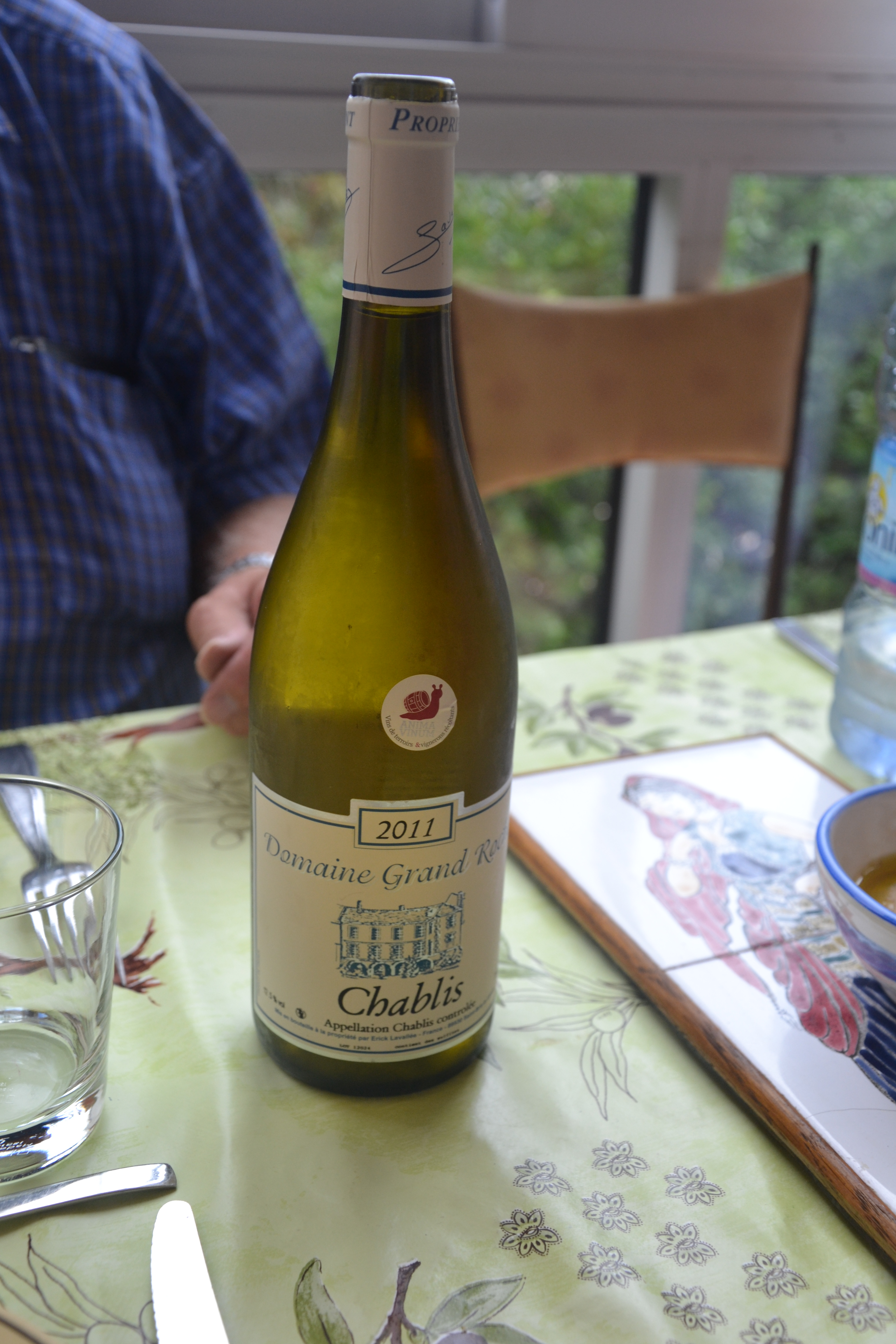 bouteille de Chablis blanc